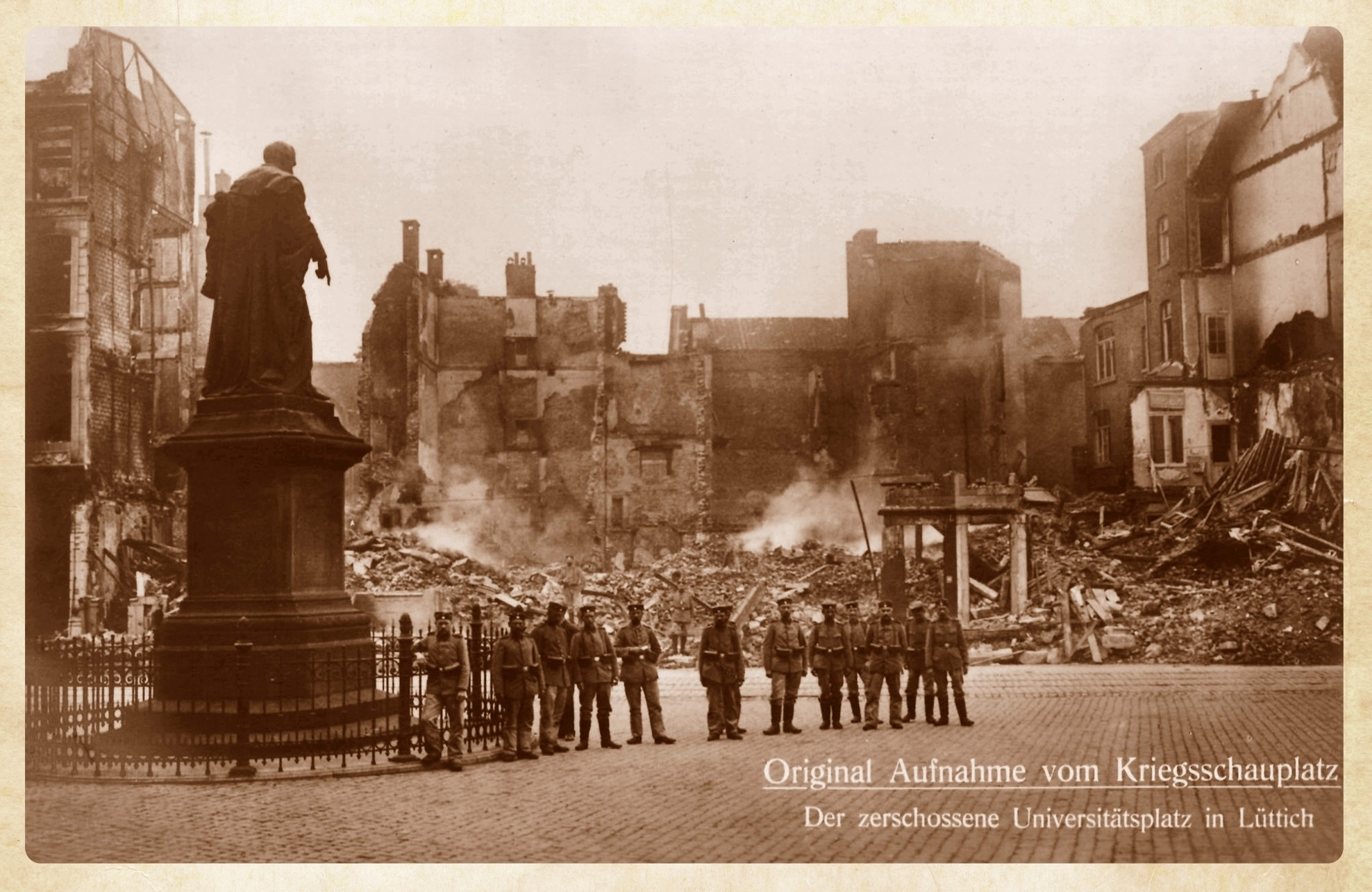 Lüttich, zerstörter Universitätsplatz, nach der Einnahme der Stadt im August 1914.